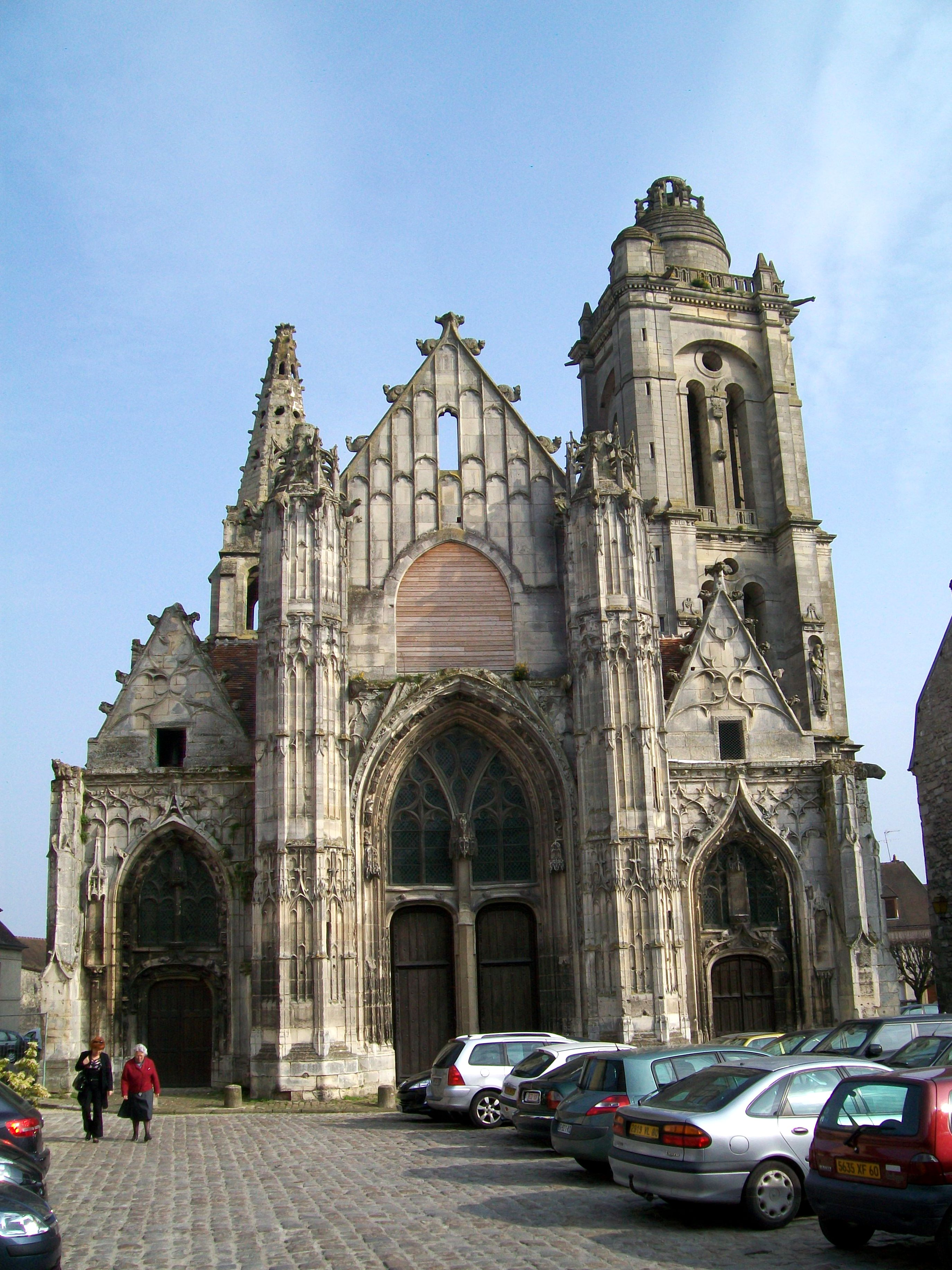 Façade ouest de l'ancienne église Saint-Pierre, qui a servi de marché couvert jusqu'en 1974. Transformé en salle polyvalente depuis.